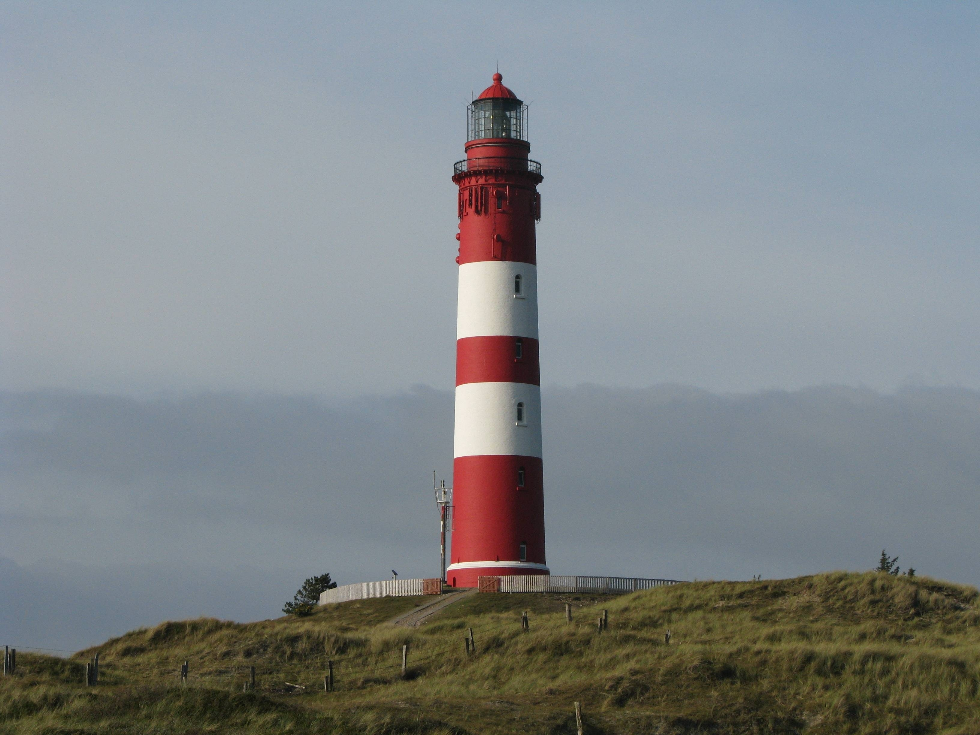 Leuchtturm Insel Amrum von 1875 (Kulturdenkmal), Turm-Höhe 67,7 m über NN, gehört zur Gemeinde Nebel; Lage: im Südwesten der Nordsee-Insel zwischen Wittdün und Nebel, Kreis Nordfriesland, Schleswig-Holstein - Foto Wolfgang Pehlemann Steinberg/Ostsee IMG 4846